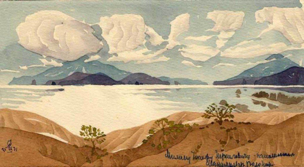 Картина Волошина "Вид на Коктебель"